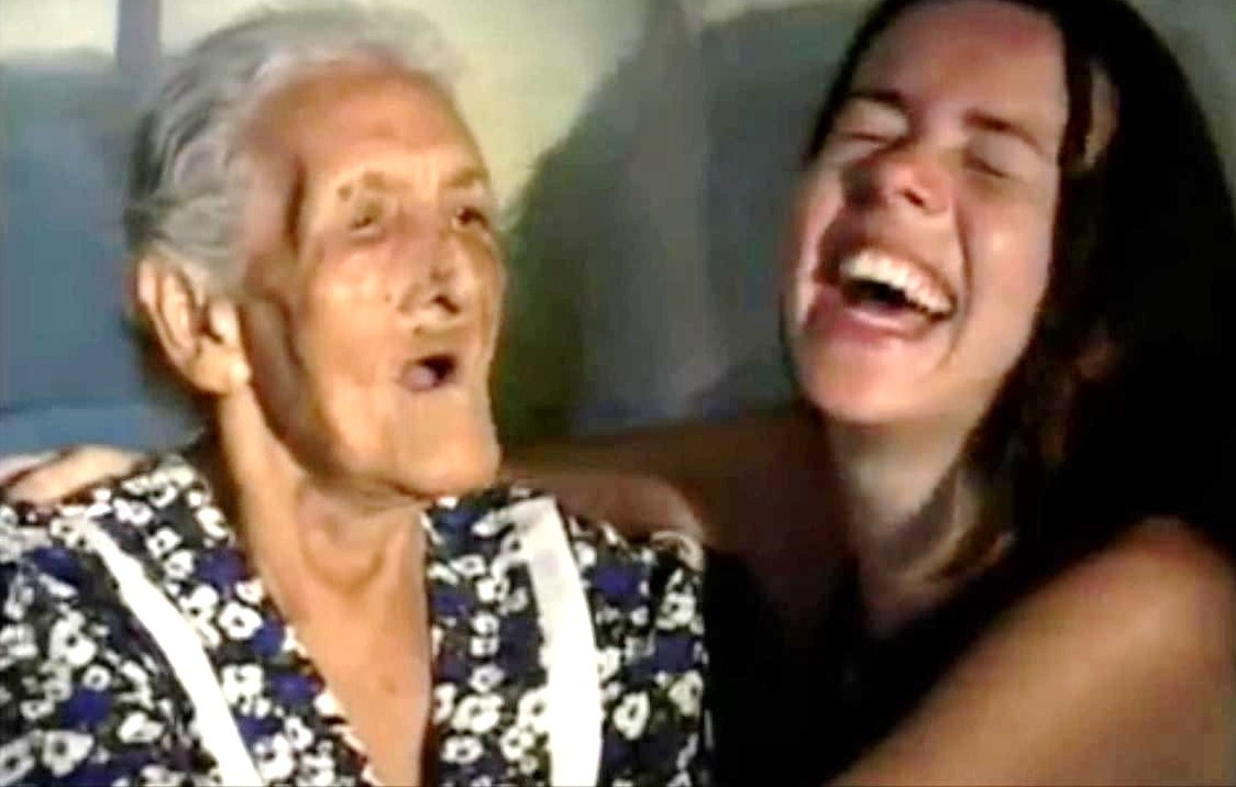 Catalina Peña de Pueblo Nuevo, quién vivió hasta los 115 años de edad